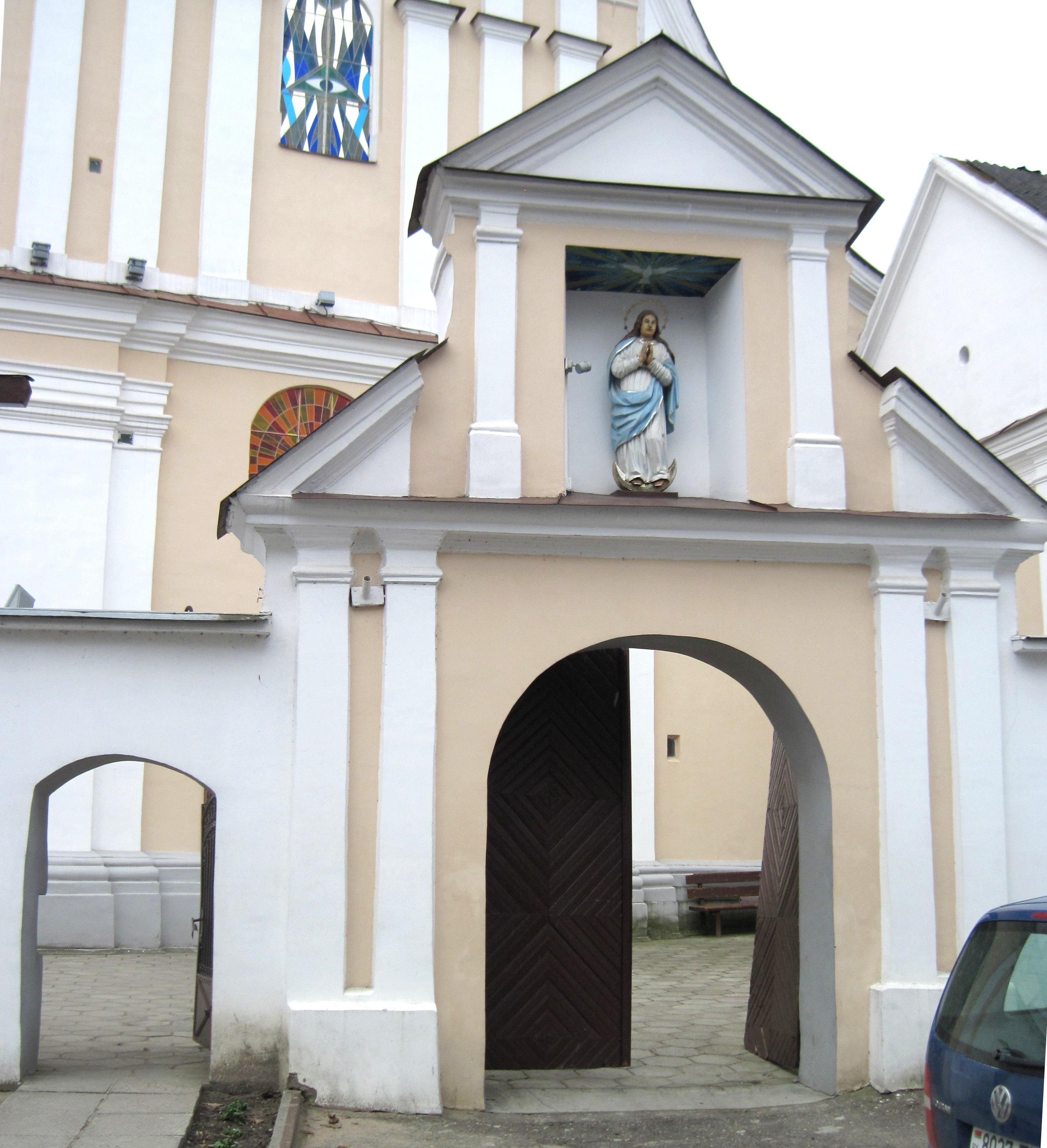 Беларуская (тарашкевіца): Галоўная брама францысканскага касцёла ў Гродне